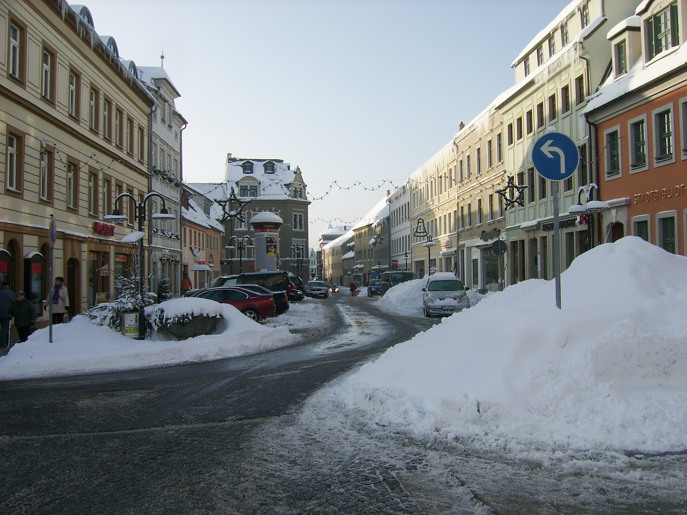 Kleiner Markt in Radeberg